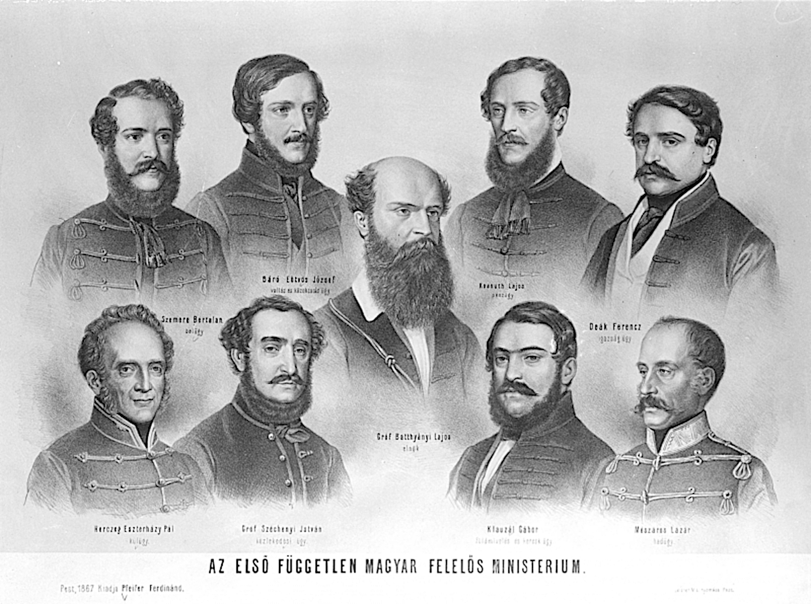 Gruppenbild Batthyány, Ludwig Graf (1809 - 1849) Deák, Franz von (1803 - 1876) Eötvös, Josef Freiherr (1813 - 1871) Esterházy, Paul Graf Baron zu Galántha (1805 - 1877) Klauzál, Gábor (1804 - 1866) Kossuth, Lajos von (1802 - 1894) Mészáros, Lázár (1796 - 1858) Széchenyi-Sárvár und Felsö-Vidék, Stefan Graf (1791 - 1860)